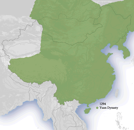 Yuen Dynasty 1294.png